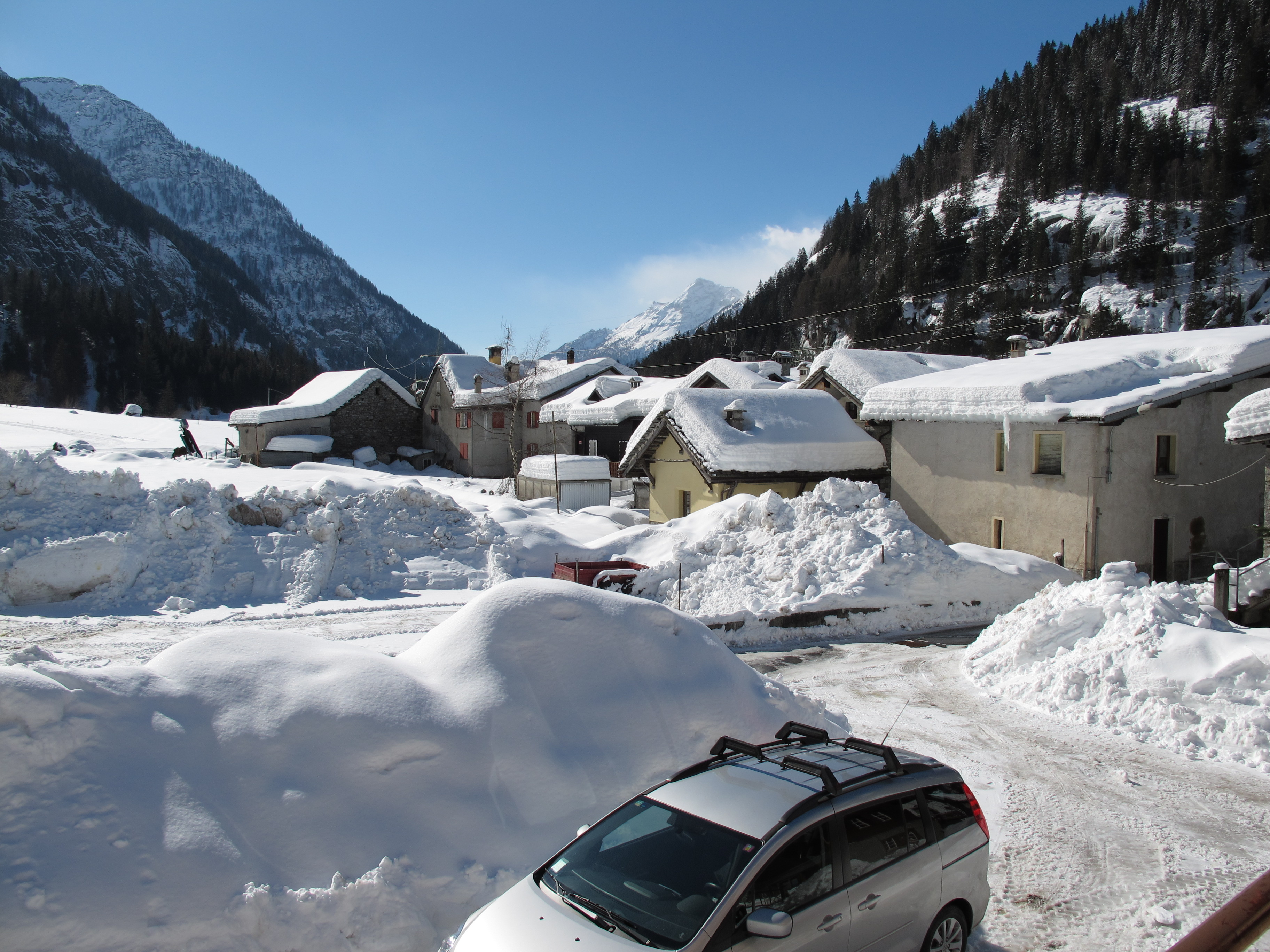 Vista del paesino di Fondo Valle.